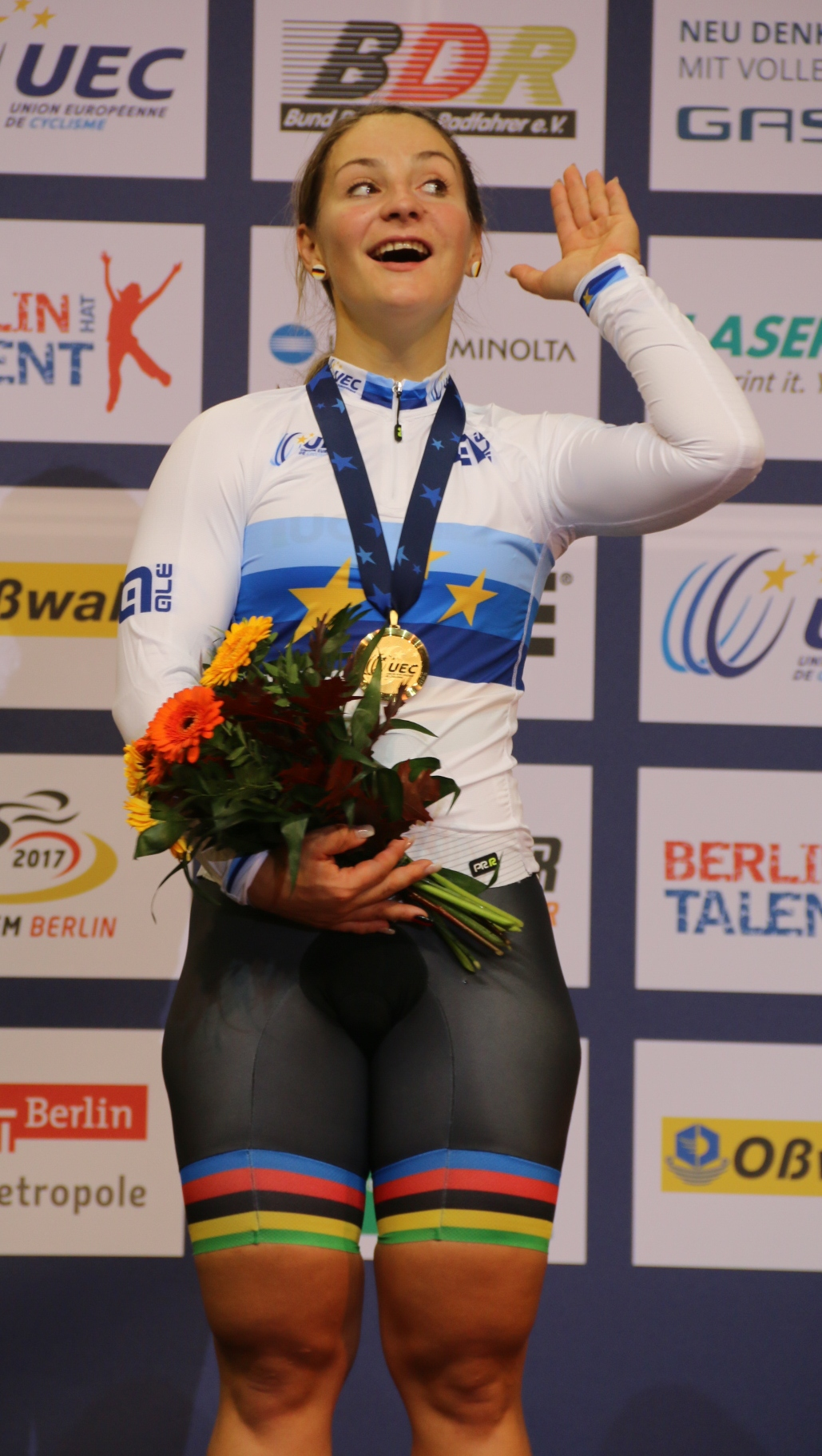 Kristina Vogel, deutscher Radsportlerin, Europameisterin im Keirin